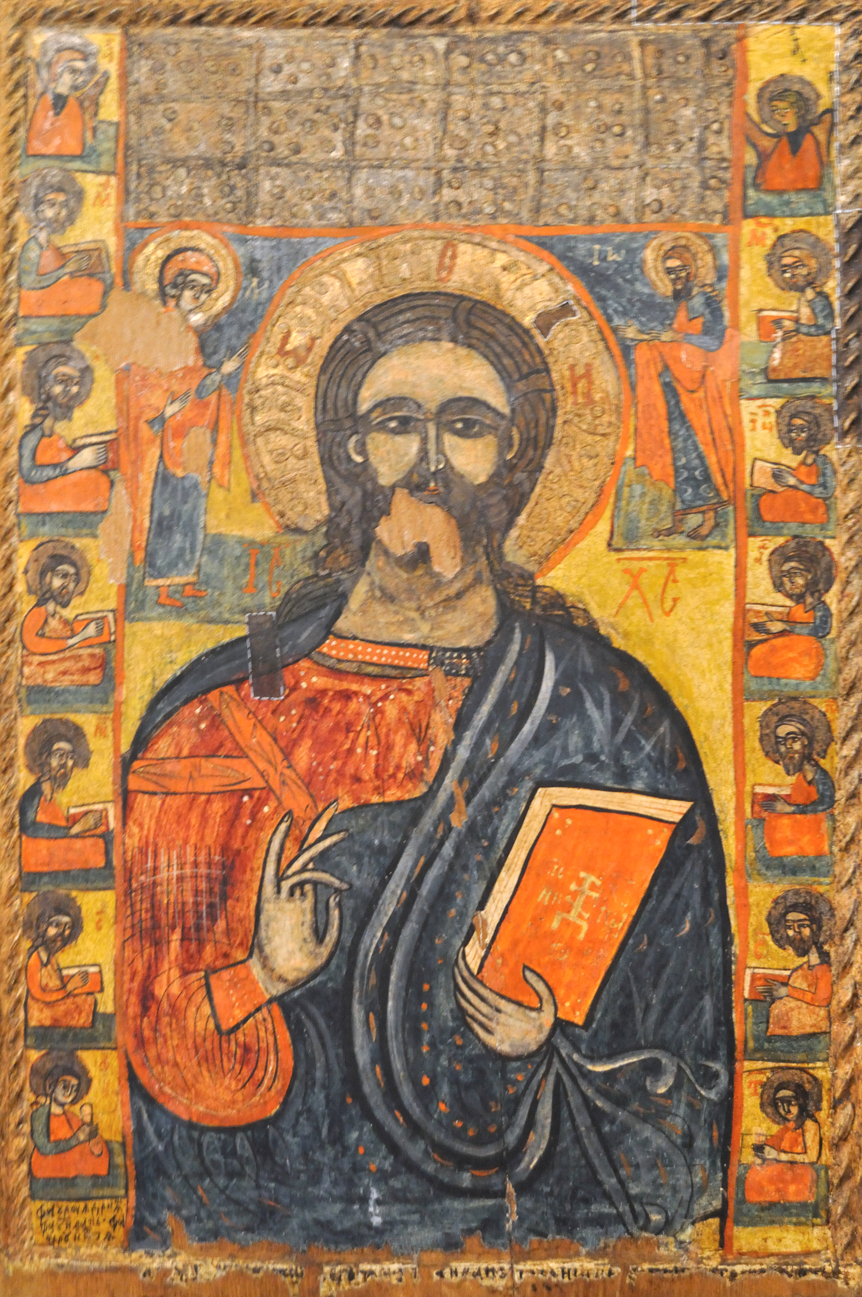 Biserica de lemn din Budești-Josani, județul Maramureș. Icoană împărătească: Isus binecuvântând